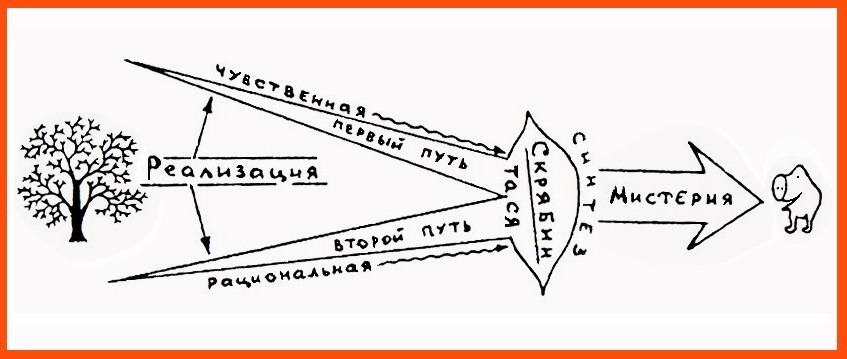 «От Экстаза к Мистерии», схема формирования личностного феномена Александра Скрябина, слегка иронический рисунок, иллюстрация к психоаналитическому тексту (автор: Юрий Ханон, картон, тушь, март 1993 года)